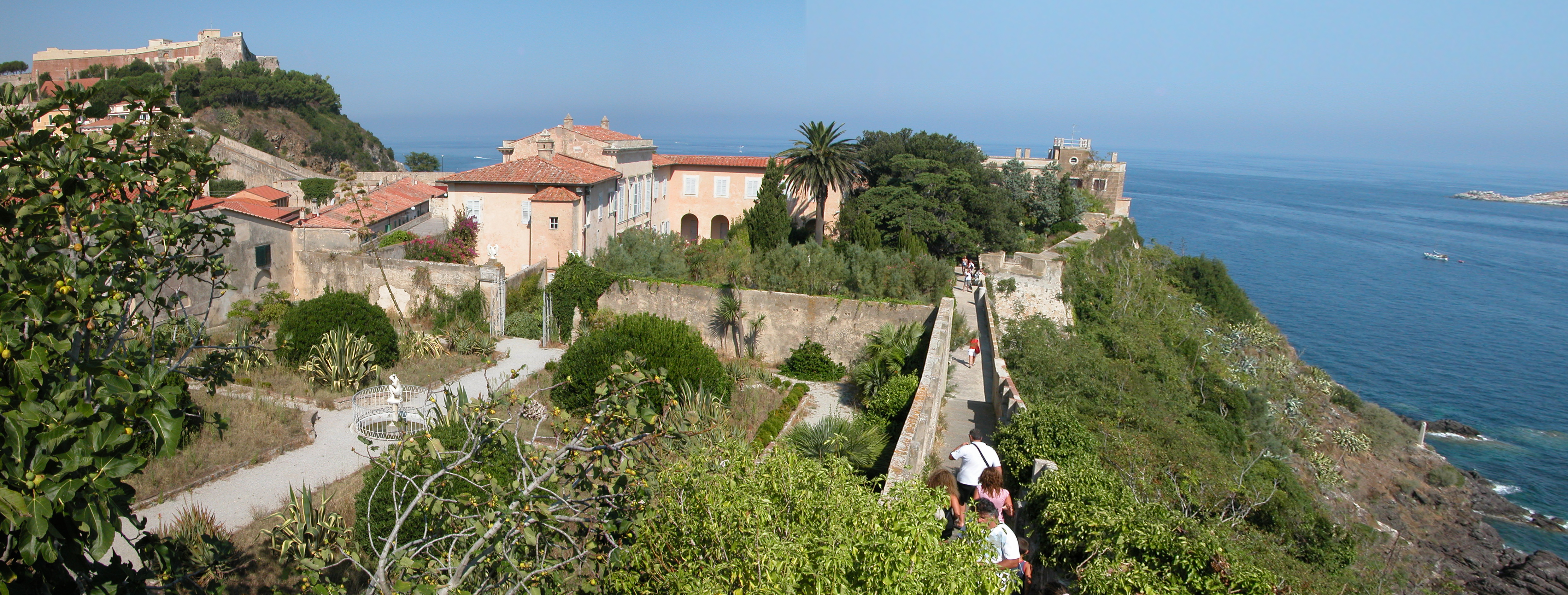 Panorama sur la fortesse Medicis (à gauche), la maison de Napoléon et ses jardins à droite, à Portoferraio